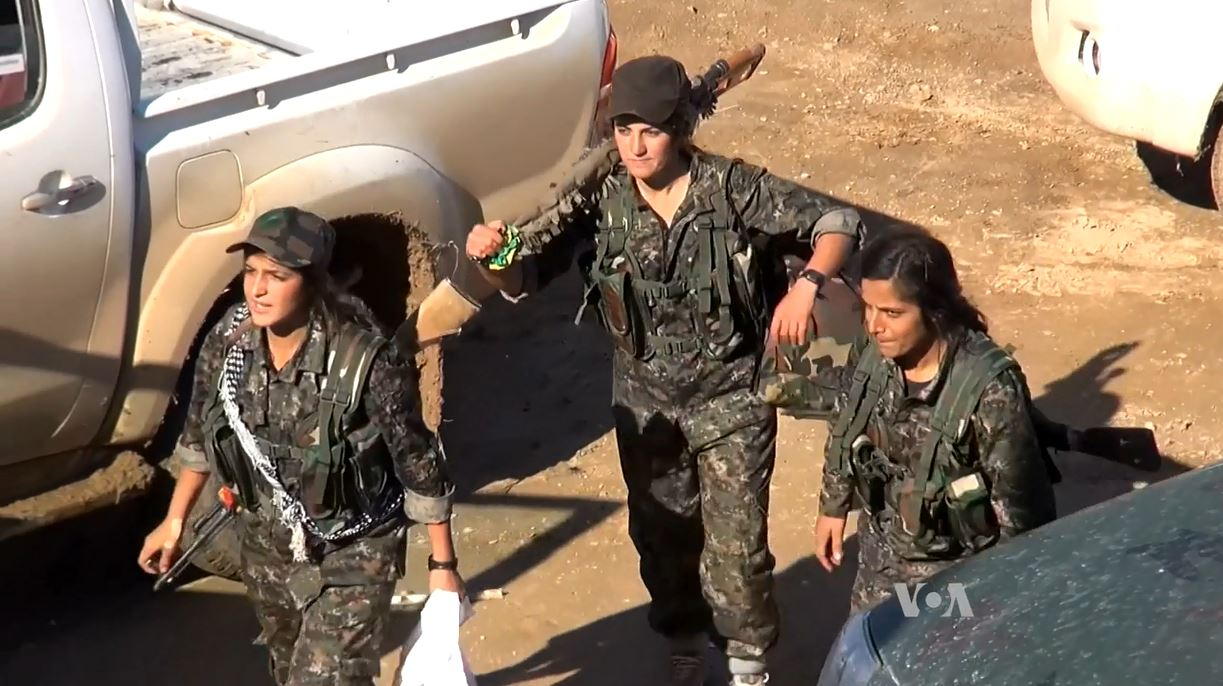 Membres des YPG à la bataille de al-Hol en Syrie en 2015.